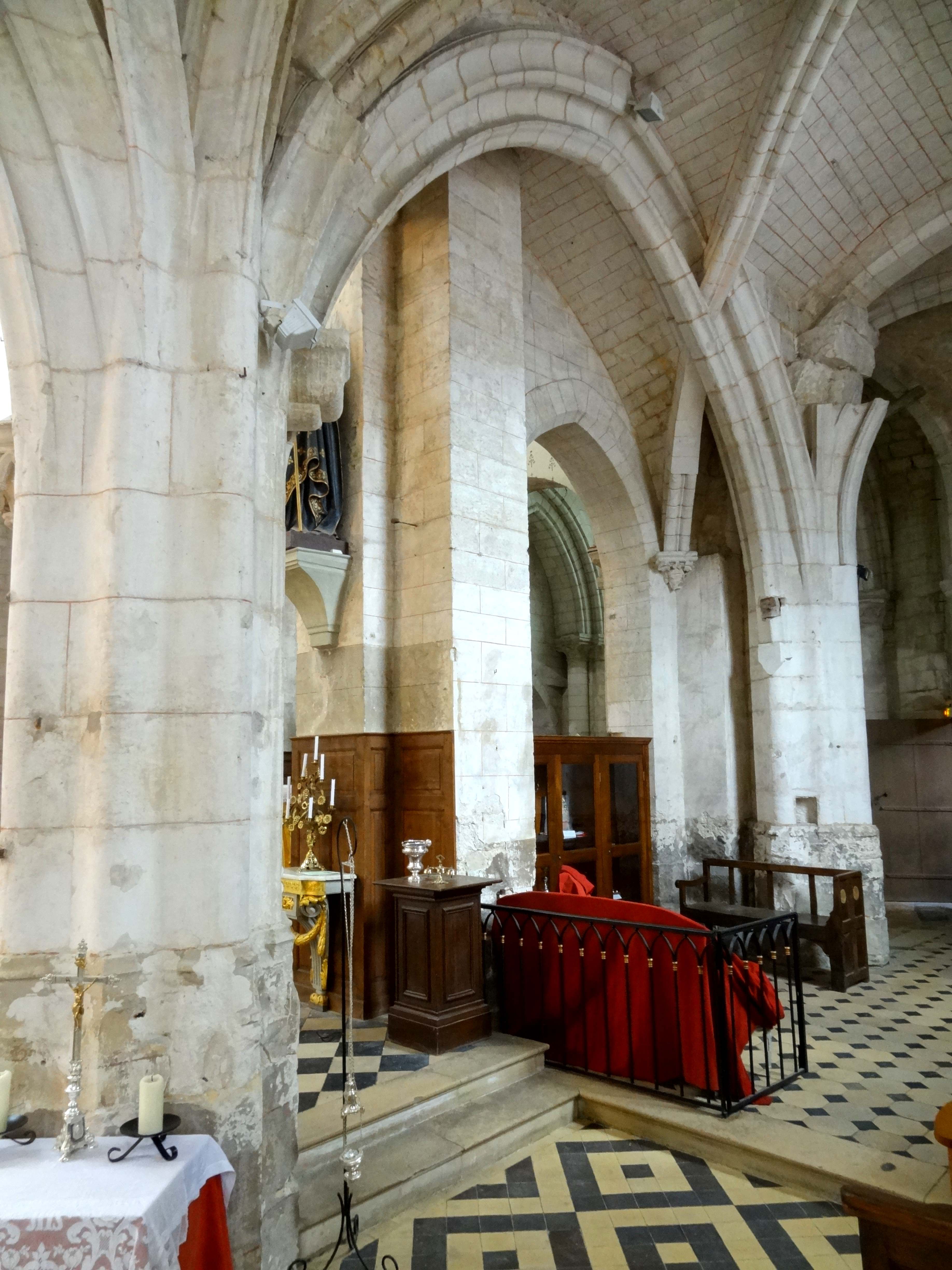 Intérieur de l'église - voir titre.